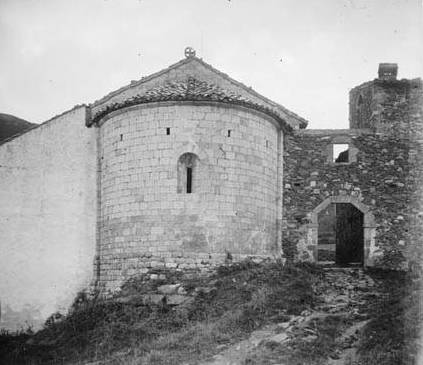 Imatge